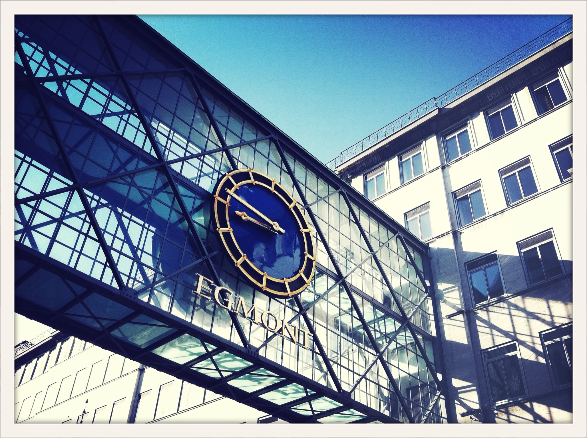 The glass bridge spans Vognmagergade